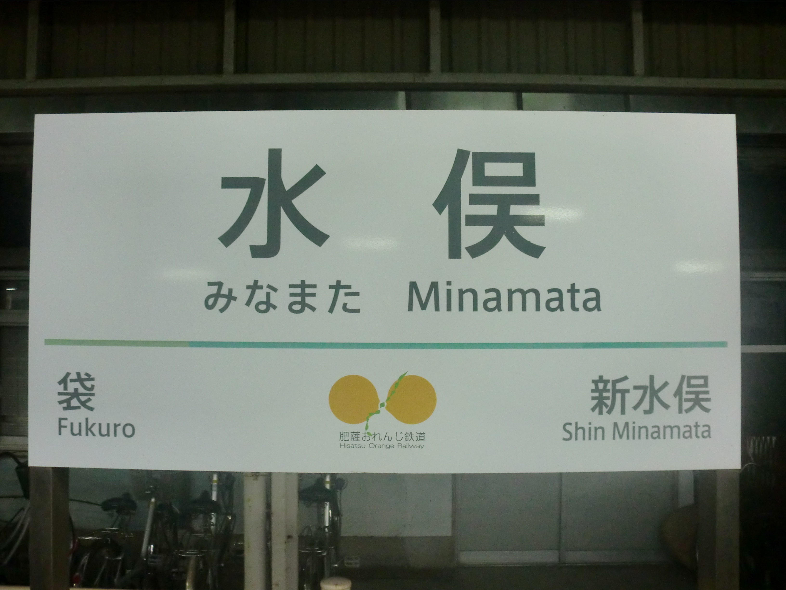 肥薩おれんじ鉄道水俣（みなまた）駅の駅名標